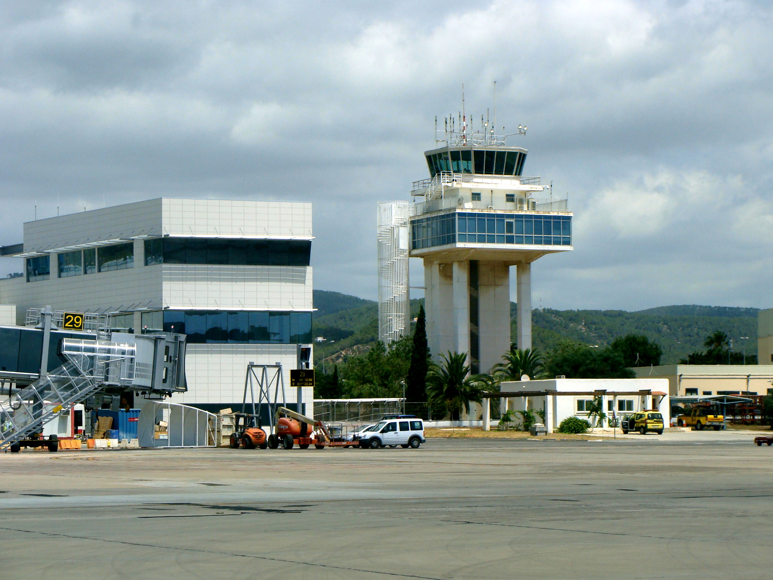 Ibiza Airport - la tour de contrôle